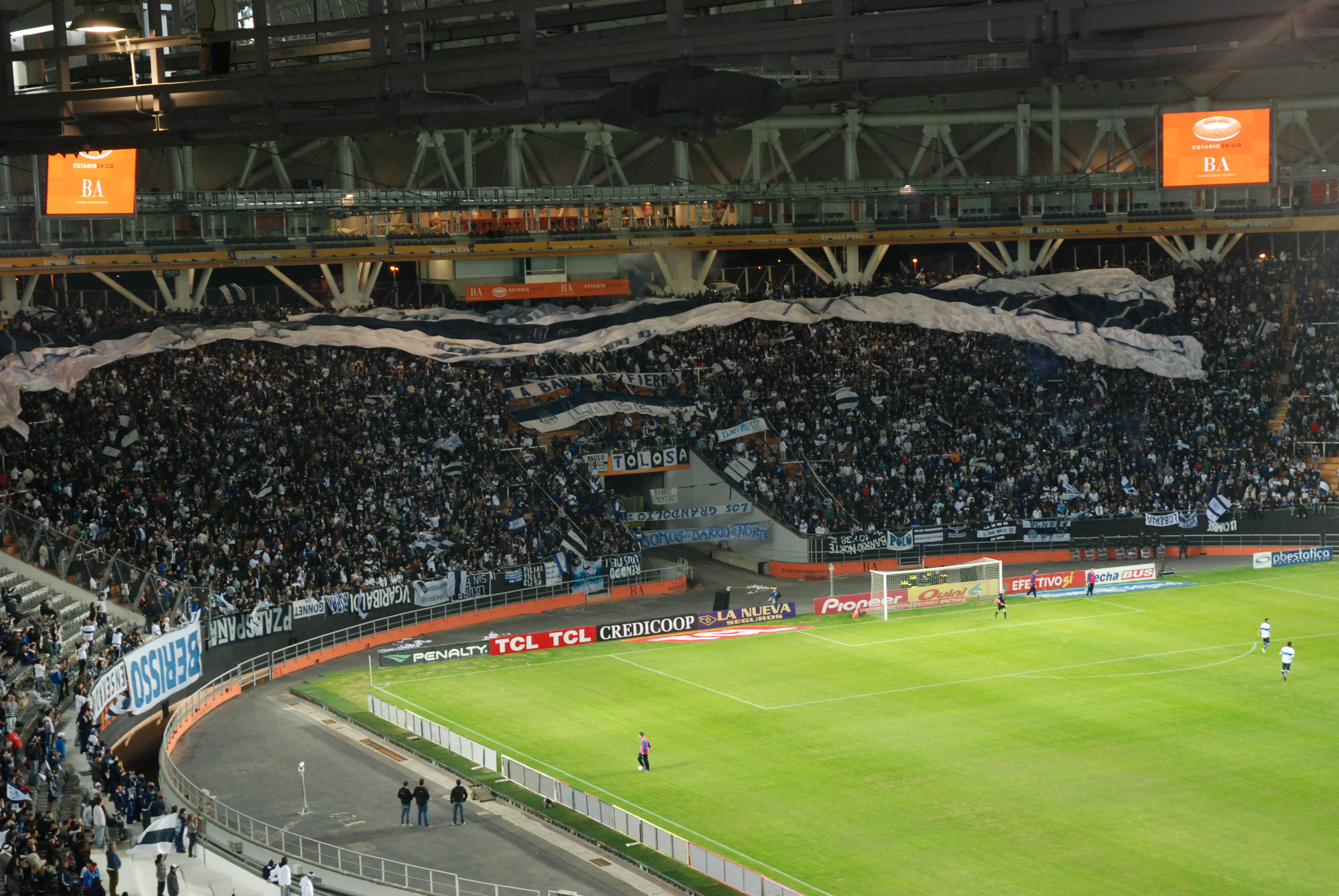 Partido de fútbol entre los clubes Gimnasia y Esgrima La Plata (local) y Sarmiento de Junín (visitante) en el Estadio Ciudad de La Plata, el 15 de junio de 2013, correspondiente a la última fecha del campeonato de Primera B Nacional 2012-2013.